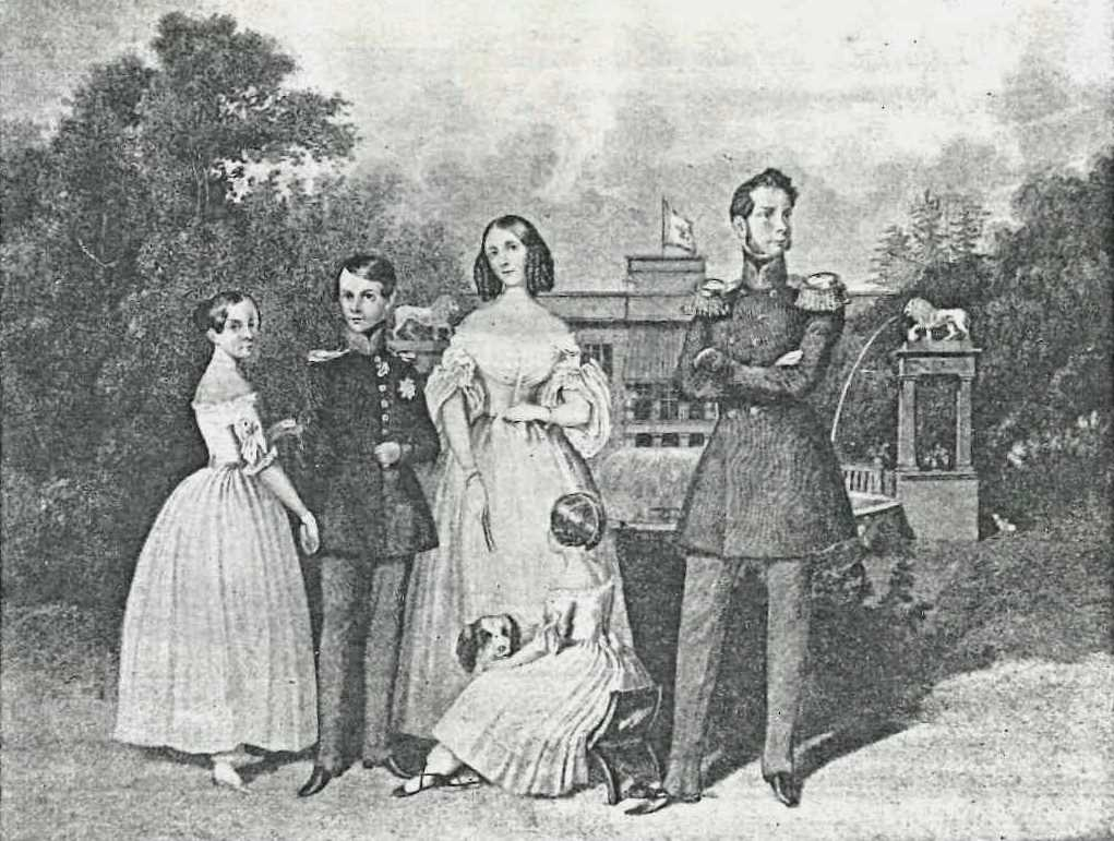 Das Prinzenpaar mit seinen Kindern vor der Löwenfontäne (Theodor Hosemann, um 1845)